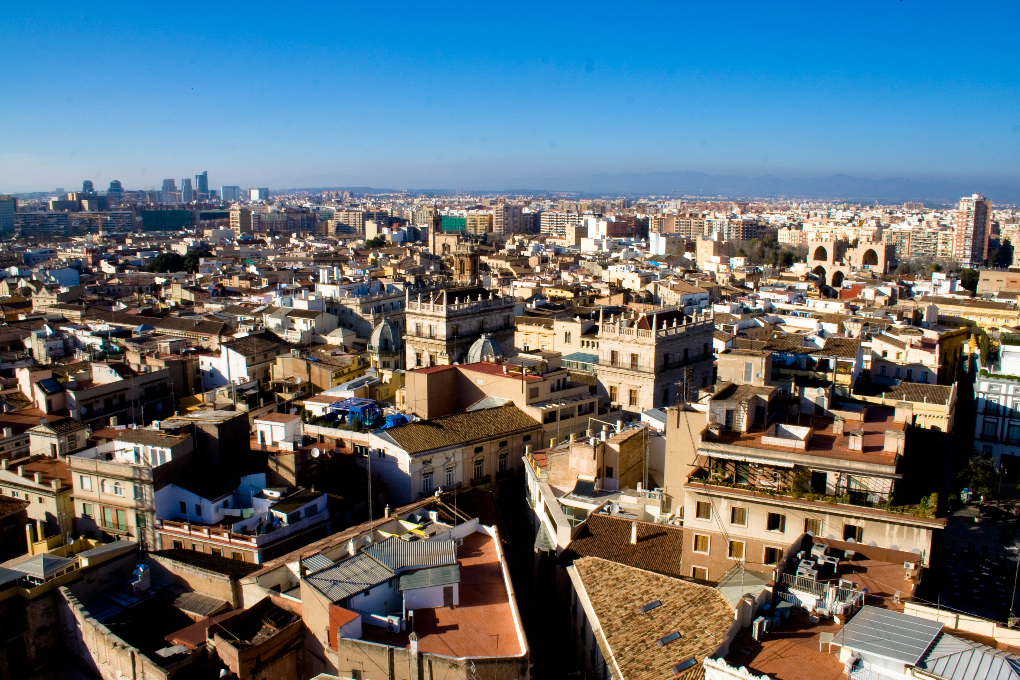 Template:Vista de Valencia desde el Micalet.